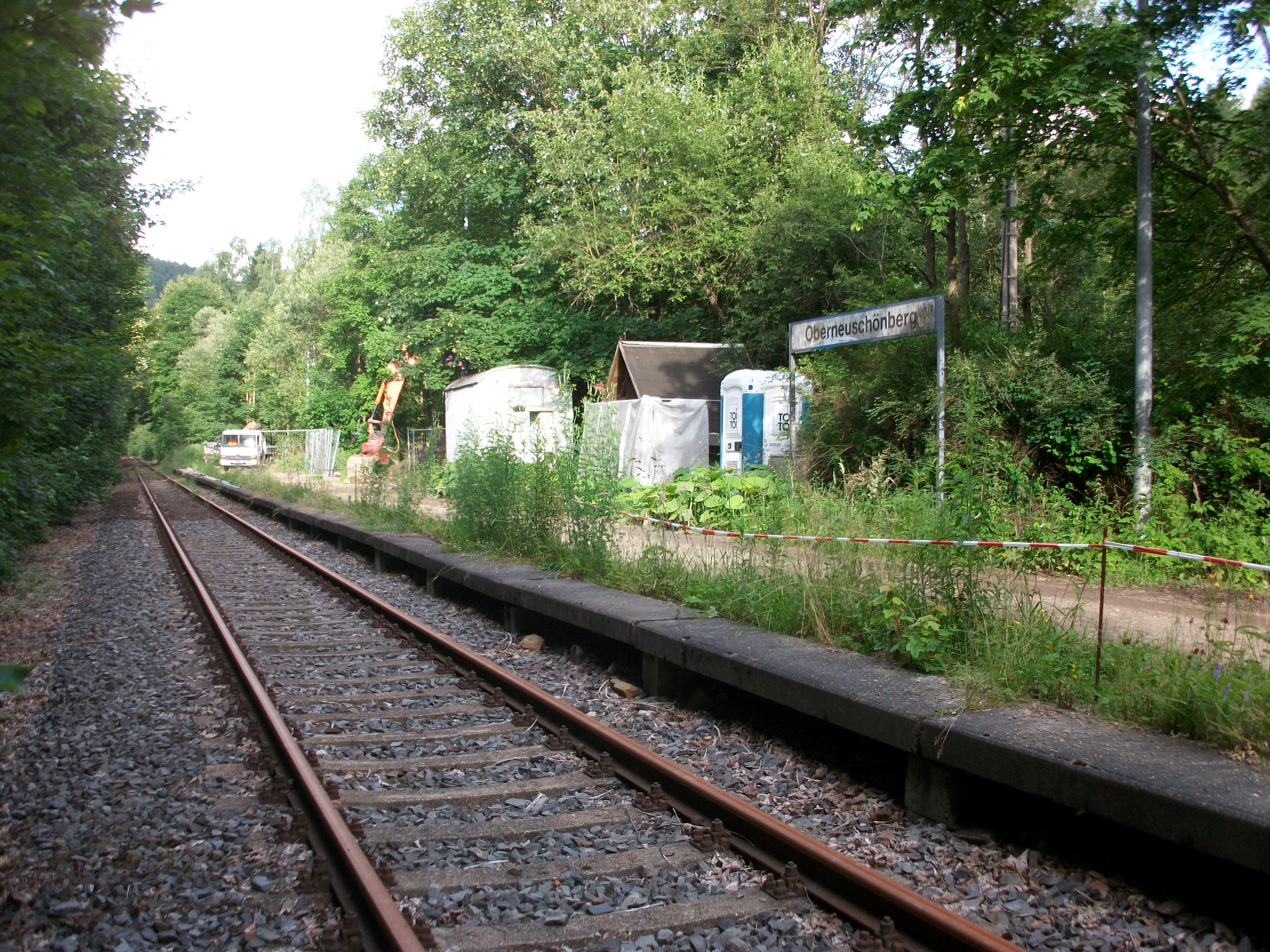 Haltepunkt Oberneuschönberg (2016)